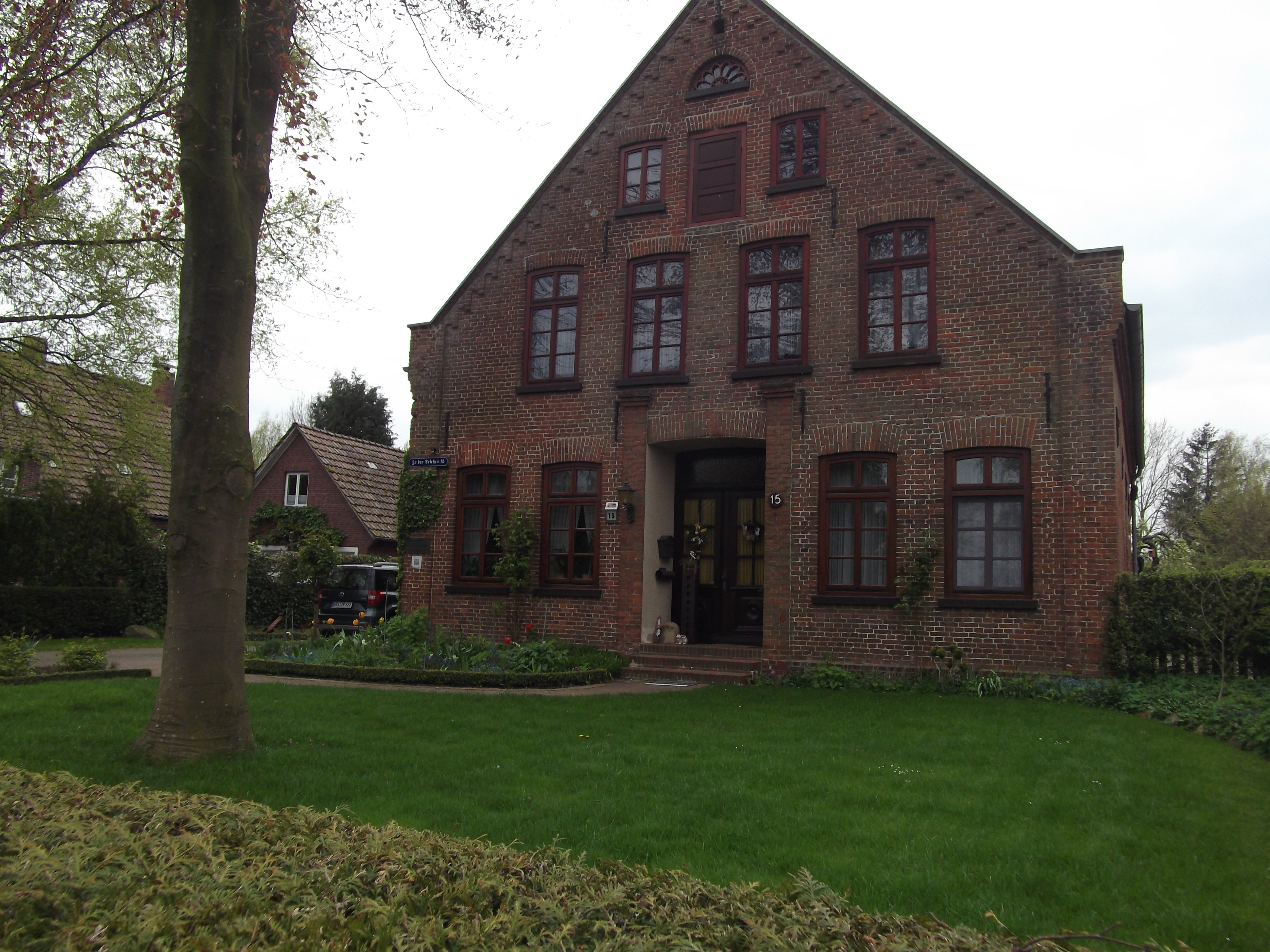 Geburtshaus von Franz Radziwill, Strohausen, Rodenkirchen (Stadland). Heutige Adresse Zu den Deichen 15